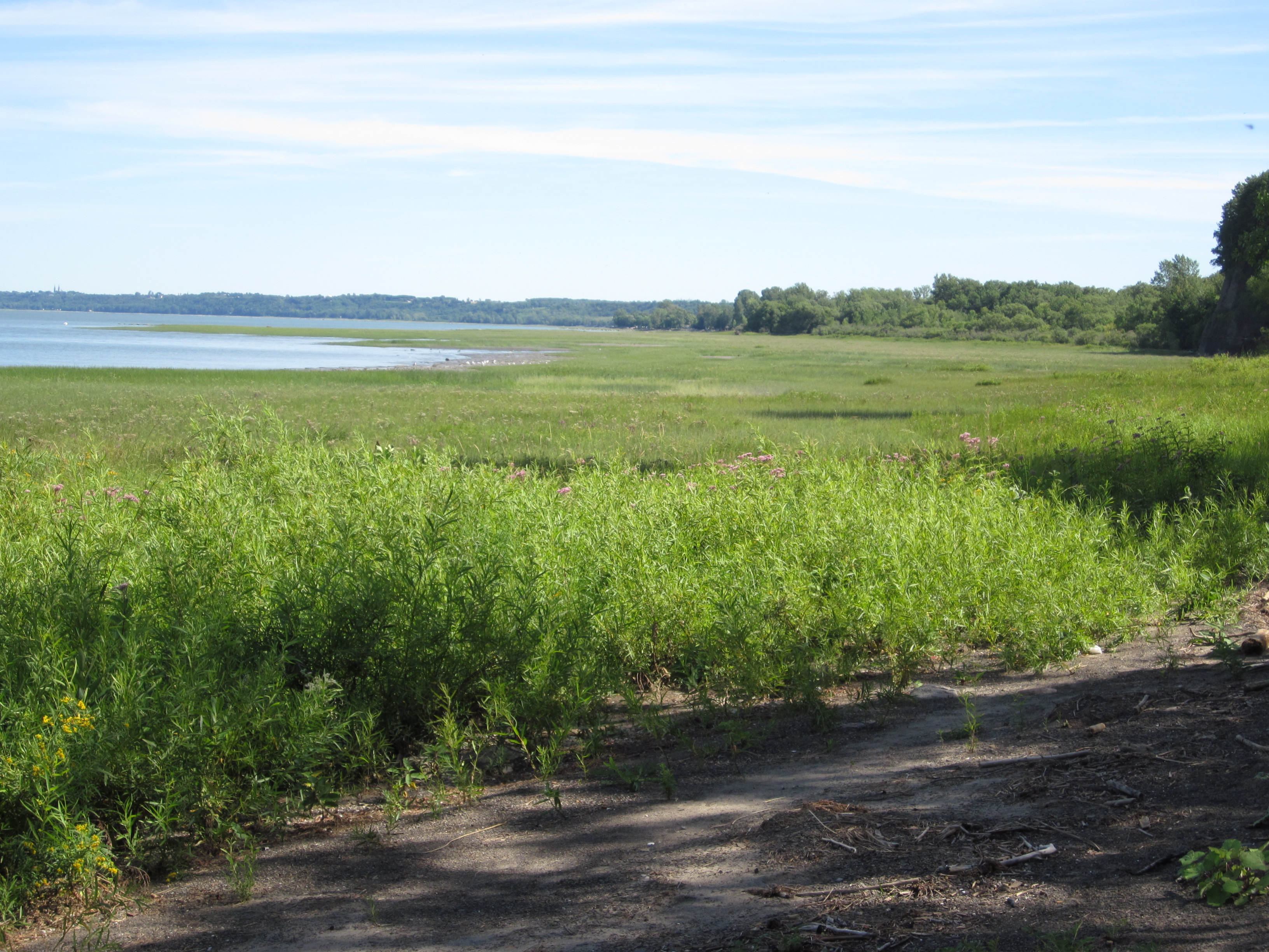 Réserve écologique de Pointe-Platon vue de la plage du Domaine Joly-De Lotbinière